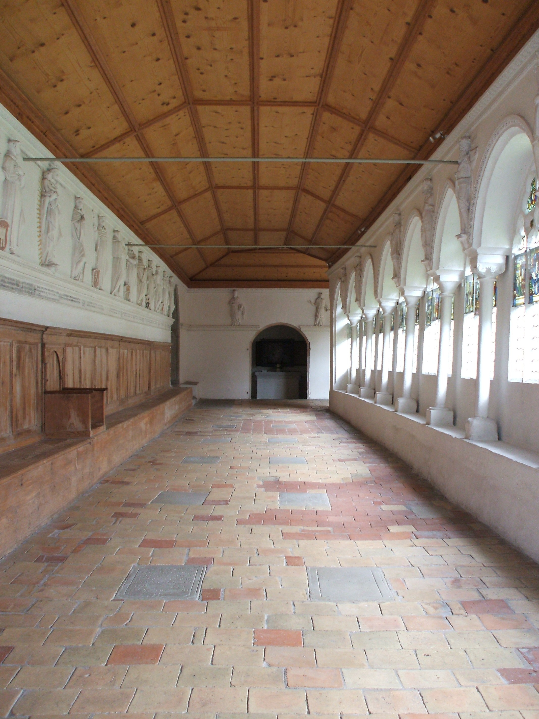 Lesegang im Kreuzgang des Klosters Wettingen.